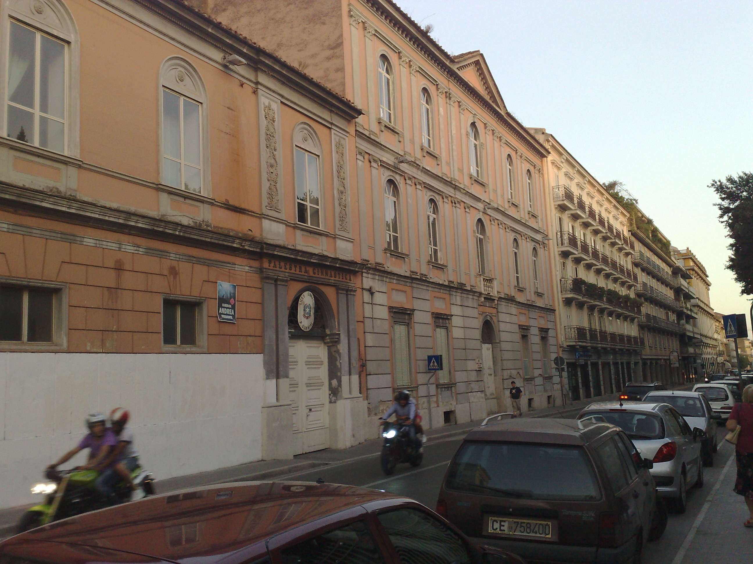 La facciata principale del Liceo sul Corso Giannone a Caserta